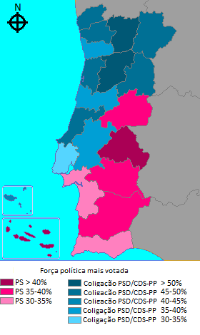 Resultados das eleições legislativas portuguesas de 2015